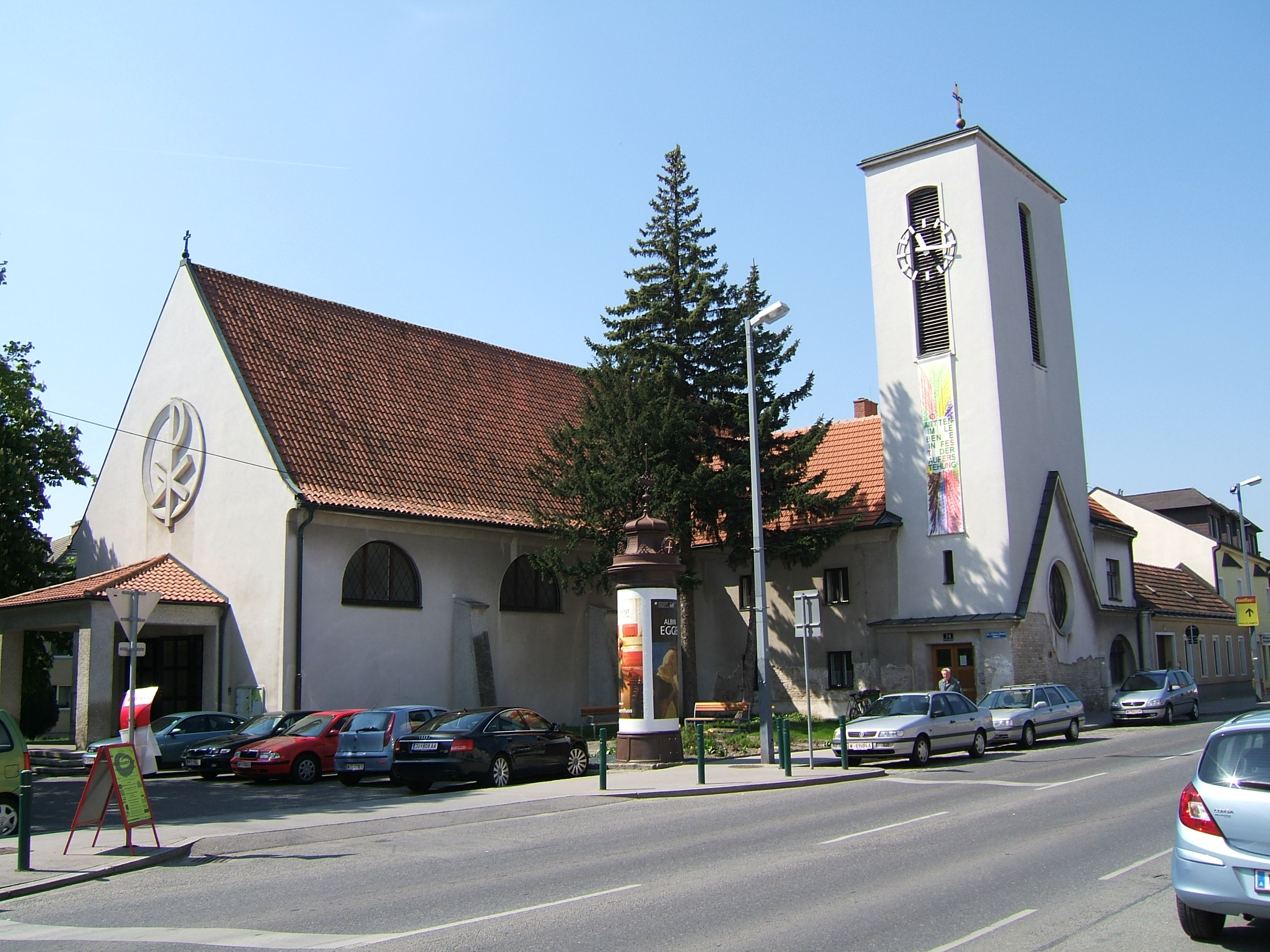 Pfarrkirche Essling, Wien 22., Esslinger Hauptstraße